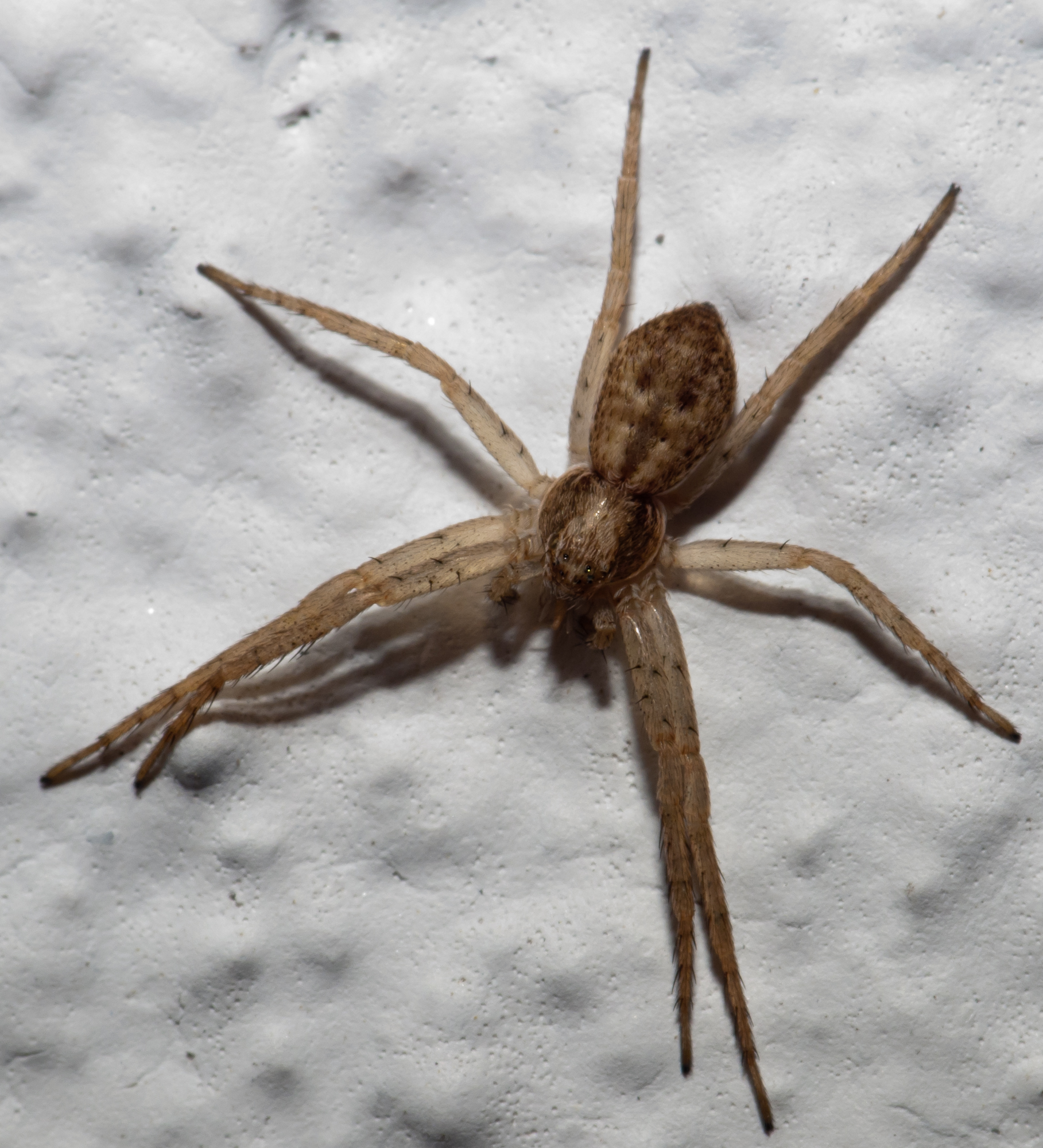 Araña (Philodromus sp.) en Bastavales, Brión, Galiza